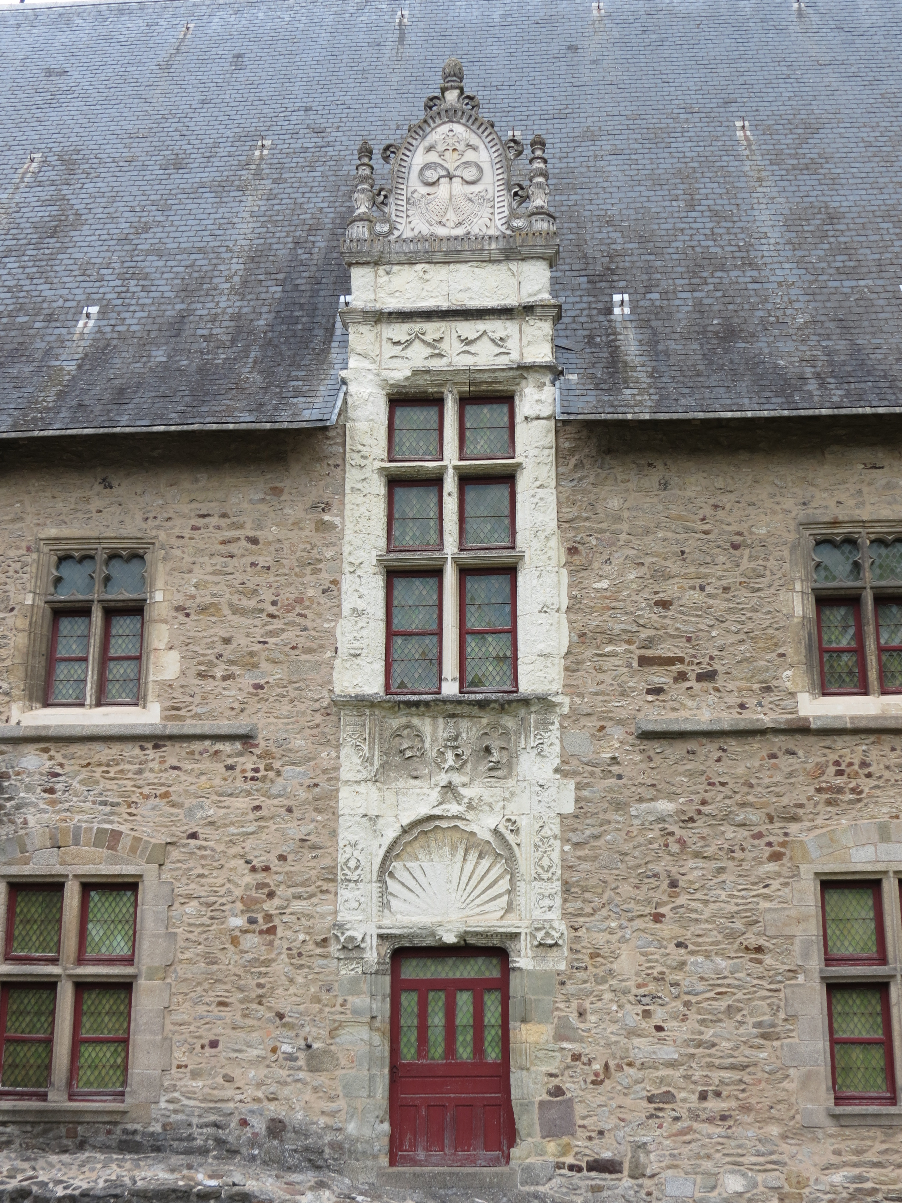 Château, Laval, Mayenne, Pays de la Loire.